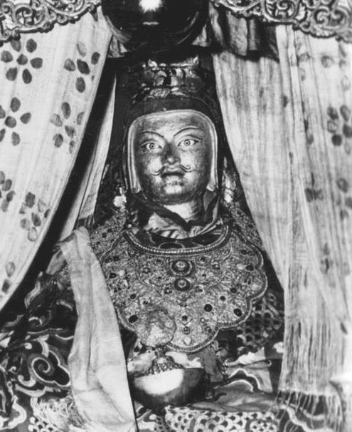 नेपाली: तिब्बत सम्यस् गोन्पामा रहेको गुरु पद्मसम्भवको मुर्ति (गुरु ङड्रमा)